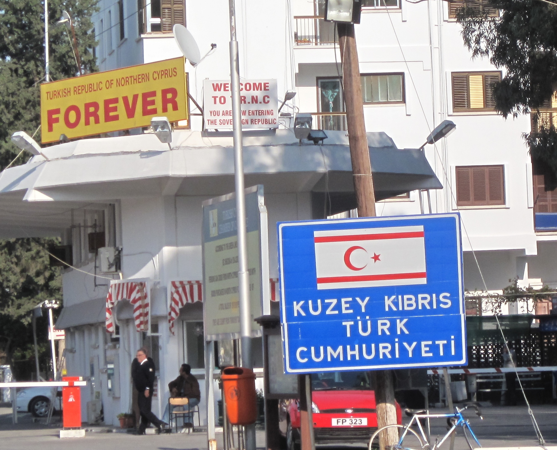 grenspost